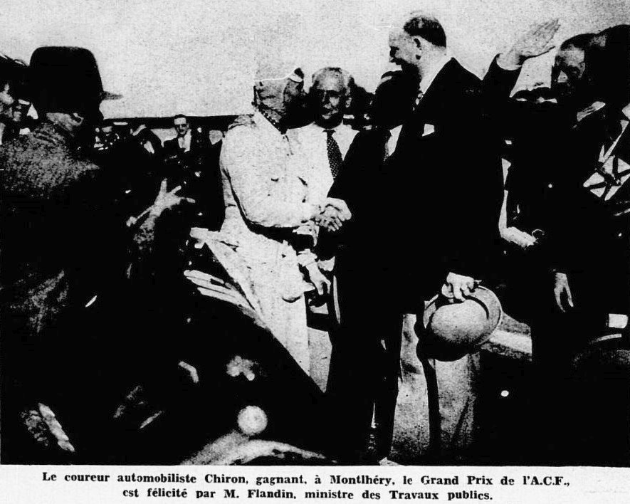 Louis Chiron, vainqueur du GP de l'A.C.F. 1934.